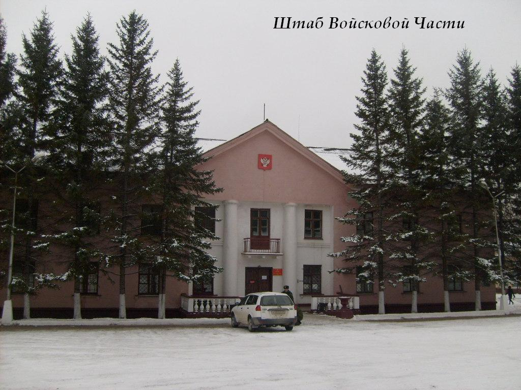 Свободный 21, штаб войсковой части